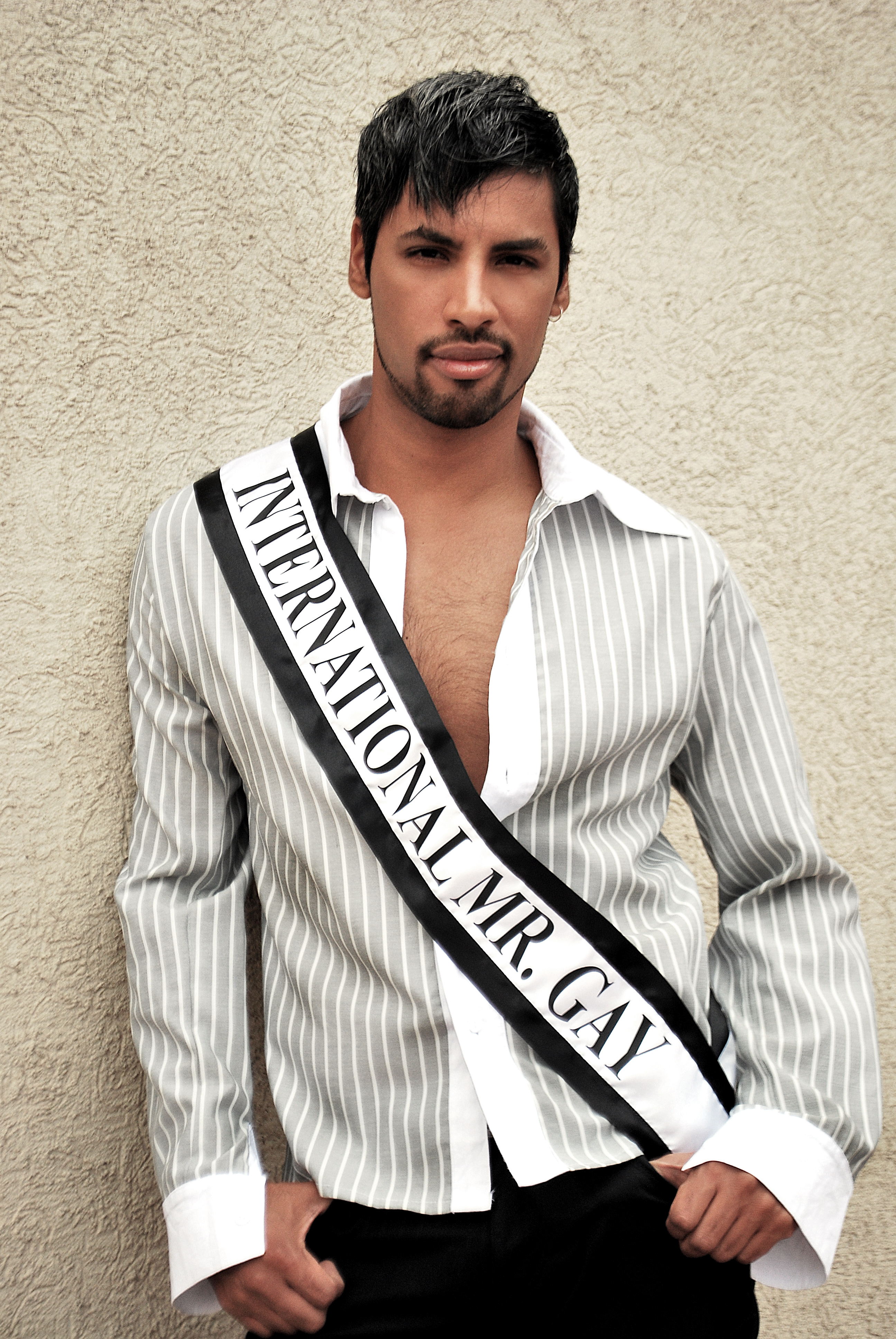 Pablo Salvador International Mr. Gay Titleholder.